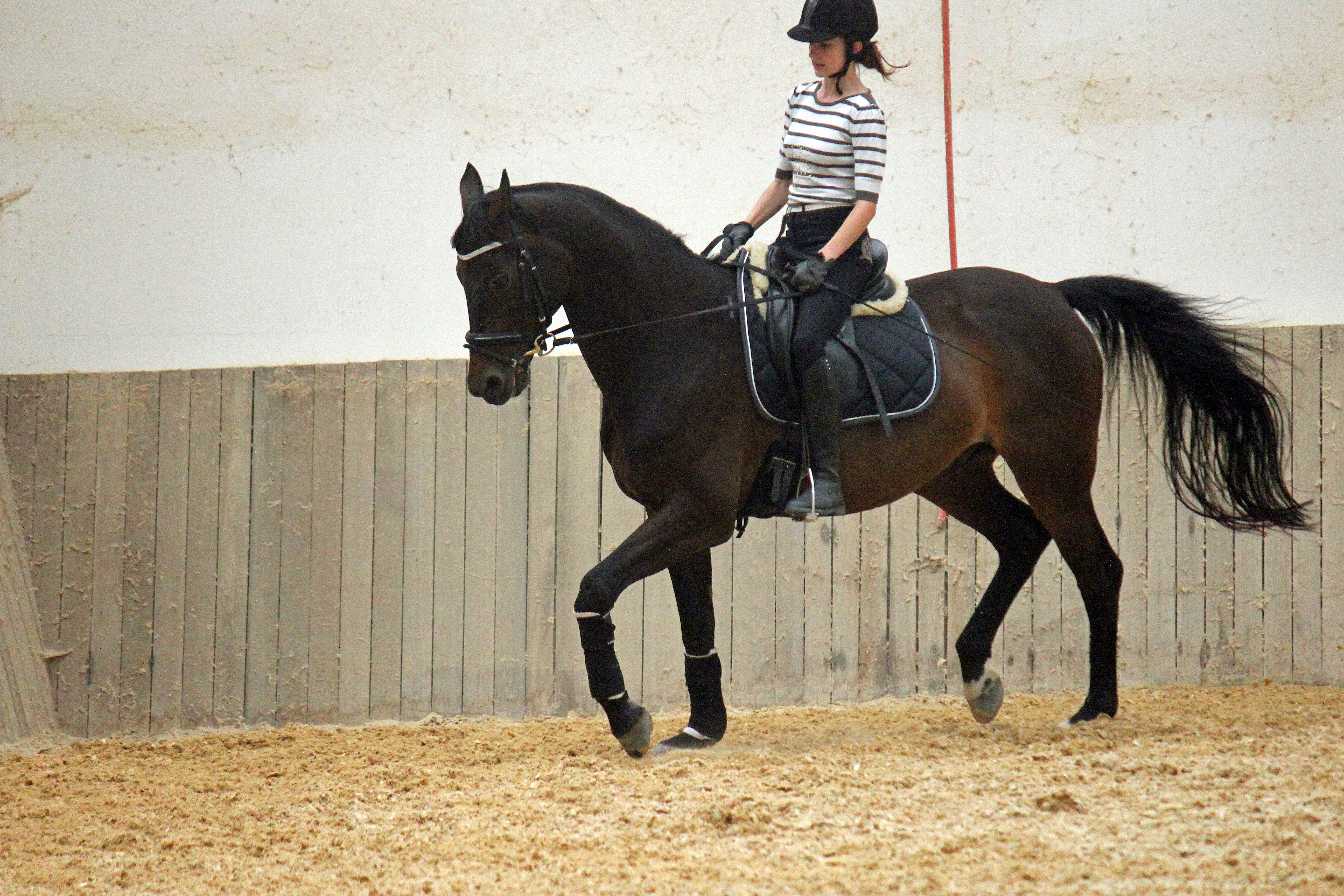 Dressur (Trakehner)